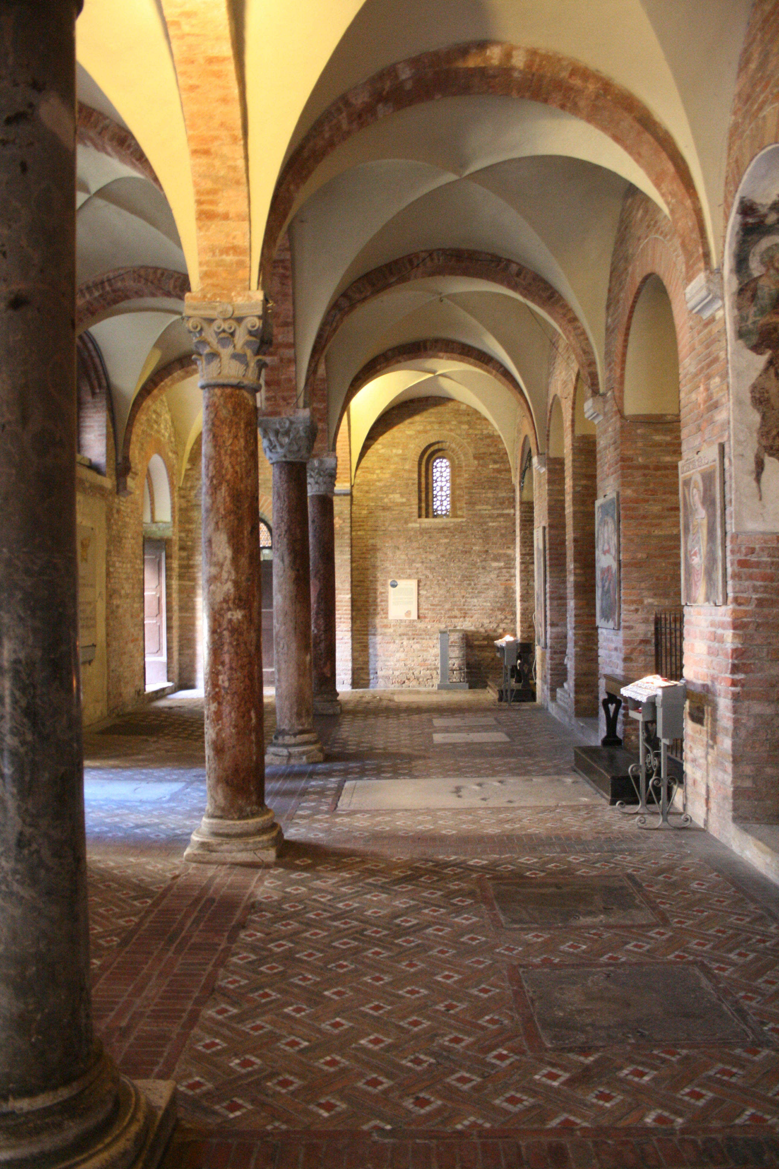 Sancta Jerusalem di Bologna. Prima Chiesa: SS. Trinità.